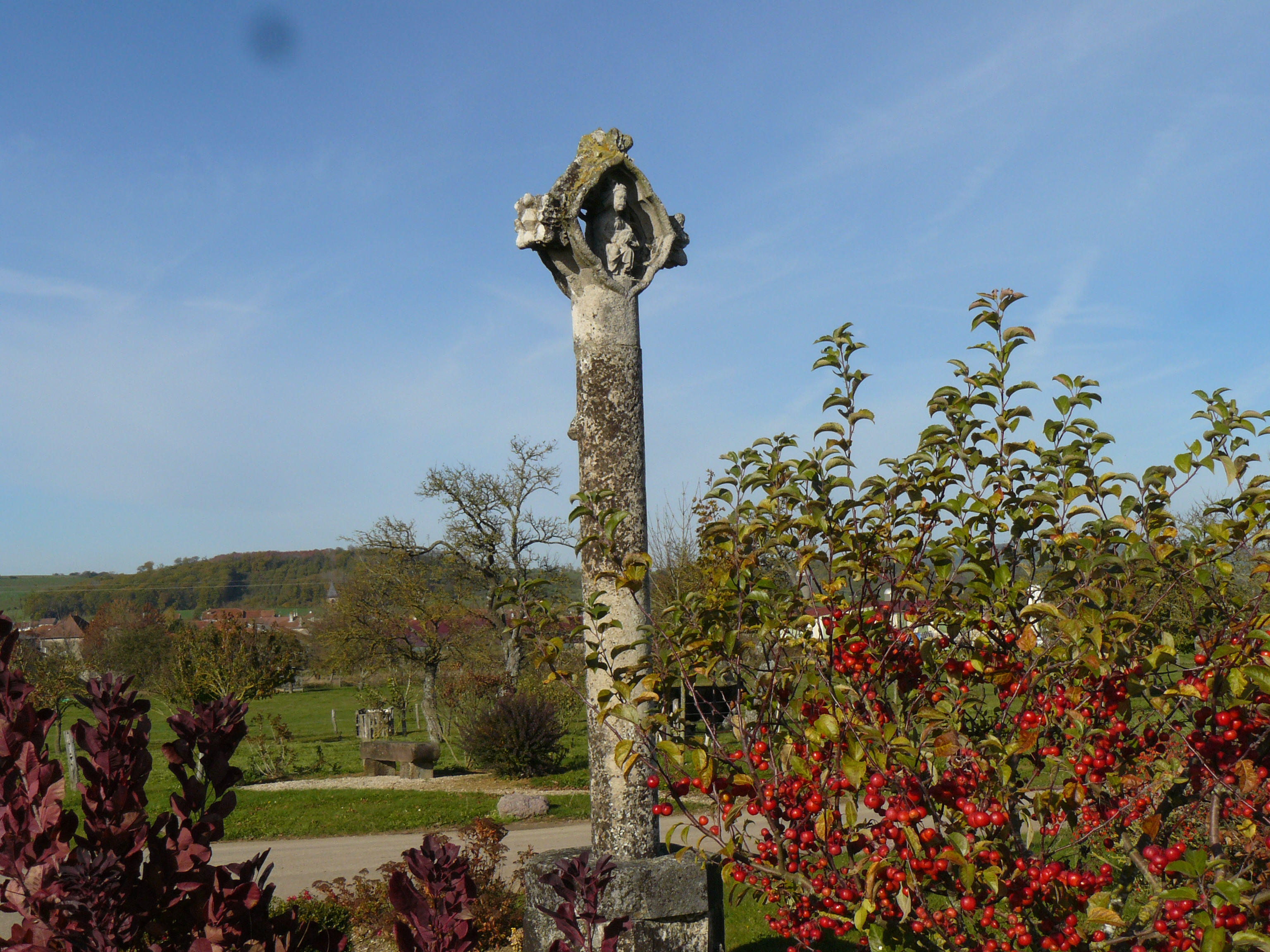 Oëlleville : la Croix des pestiférés